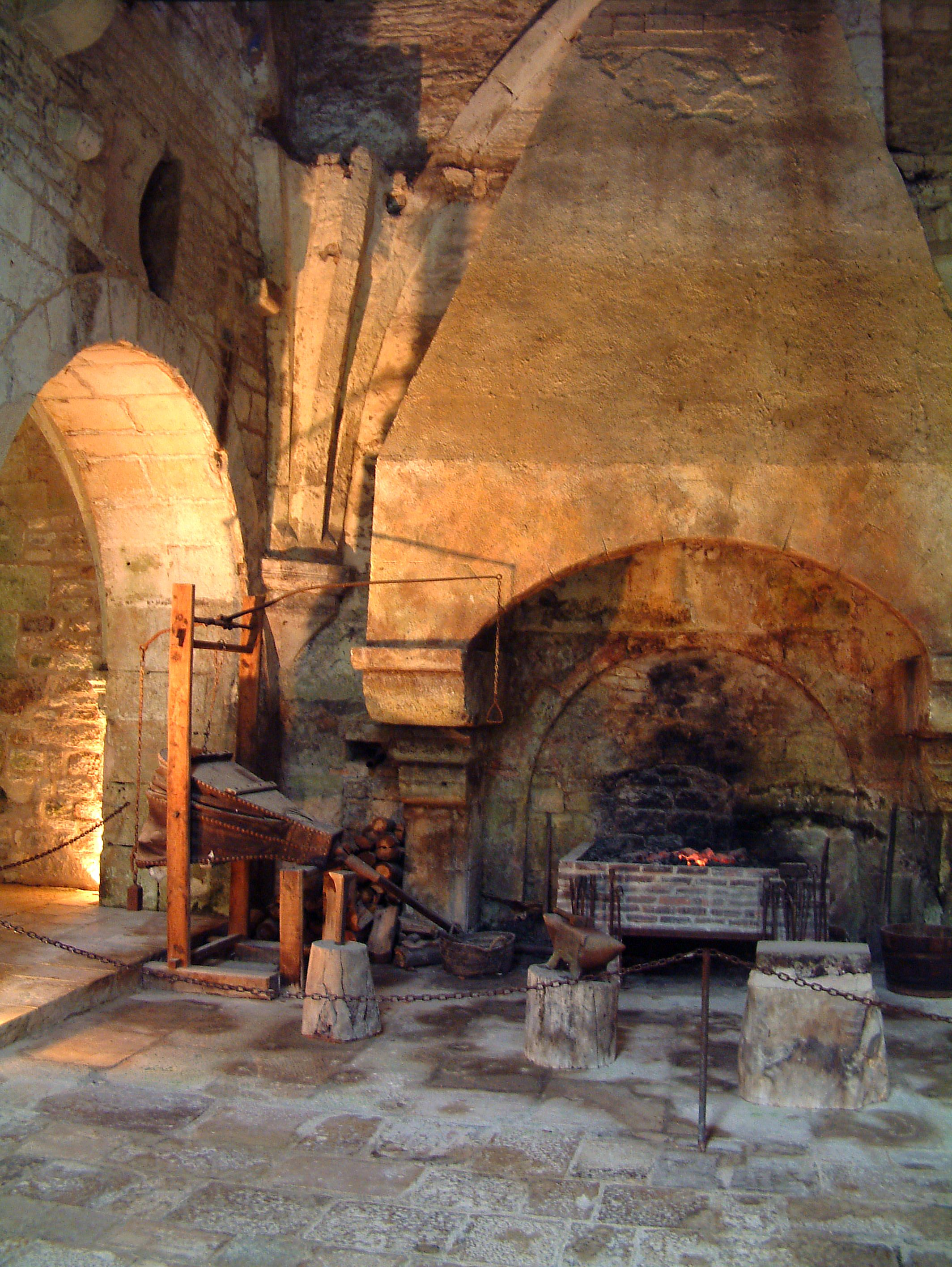 Abadia de Fontenay - La Forja